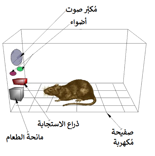 صُندوق تكييف، وهو قفصٌ يُستخدم في إجراء بعض التجارب السُلُوكيَّة على الحيوانات.